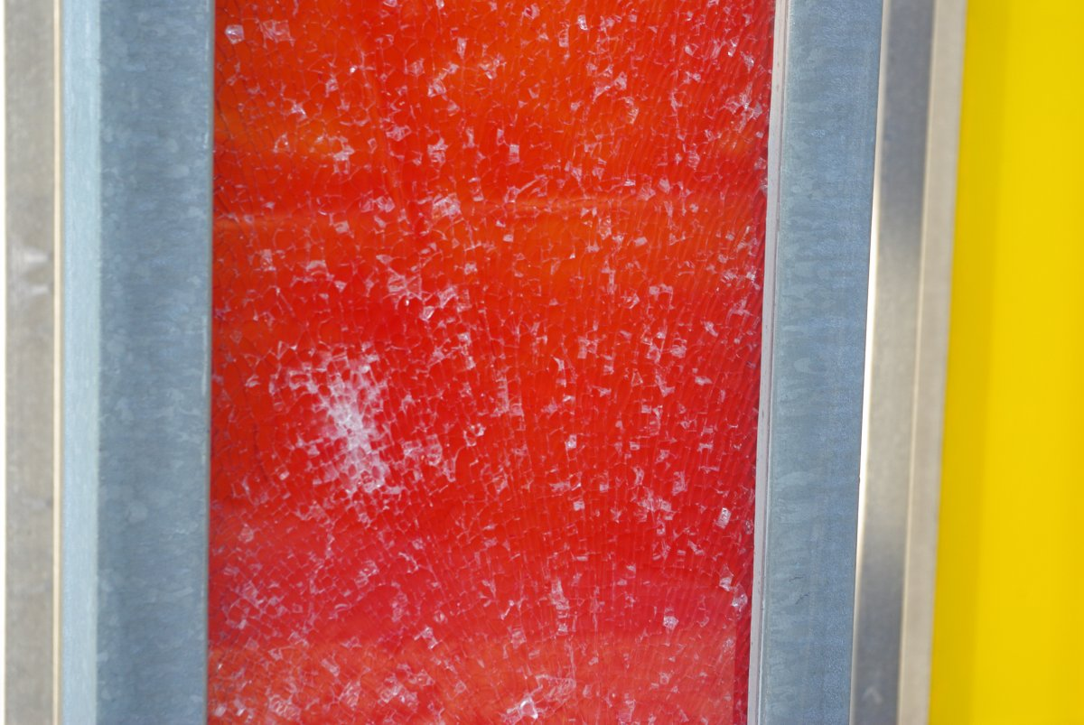 Gedenkstätte für die Opfer des Eishalleneinsturzes 2006 an der Münchner Allee in 83435 Bad Reichenhall; Vandalismus an einer der Stelen